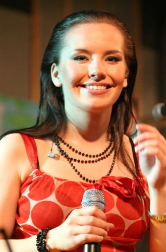 Anneli Mattila keikalla Tuuloksella 2007.